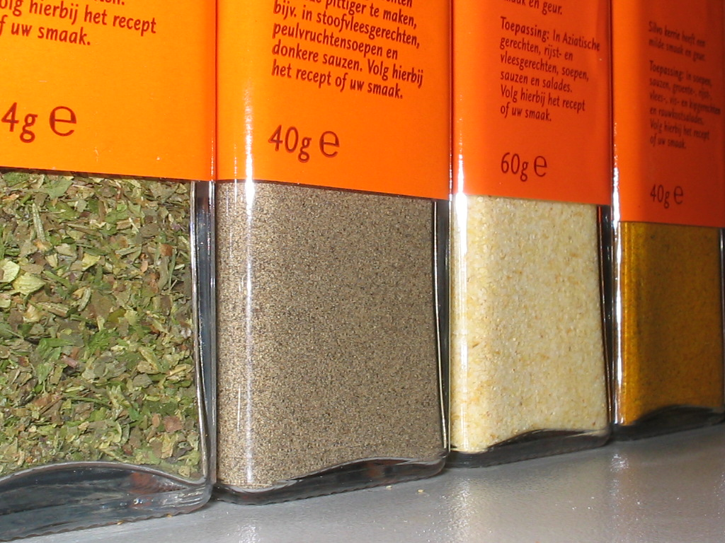 kruidenrekje